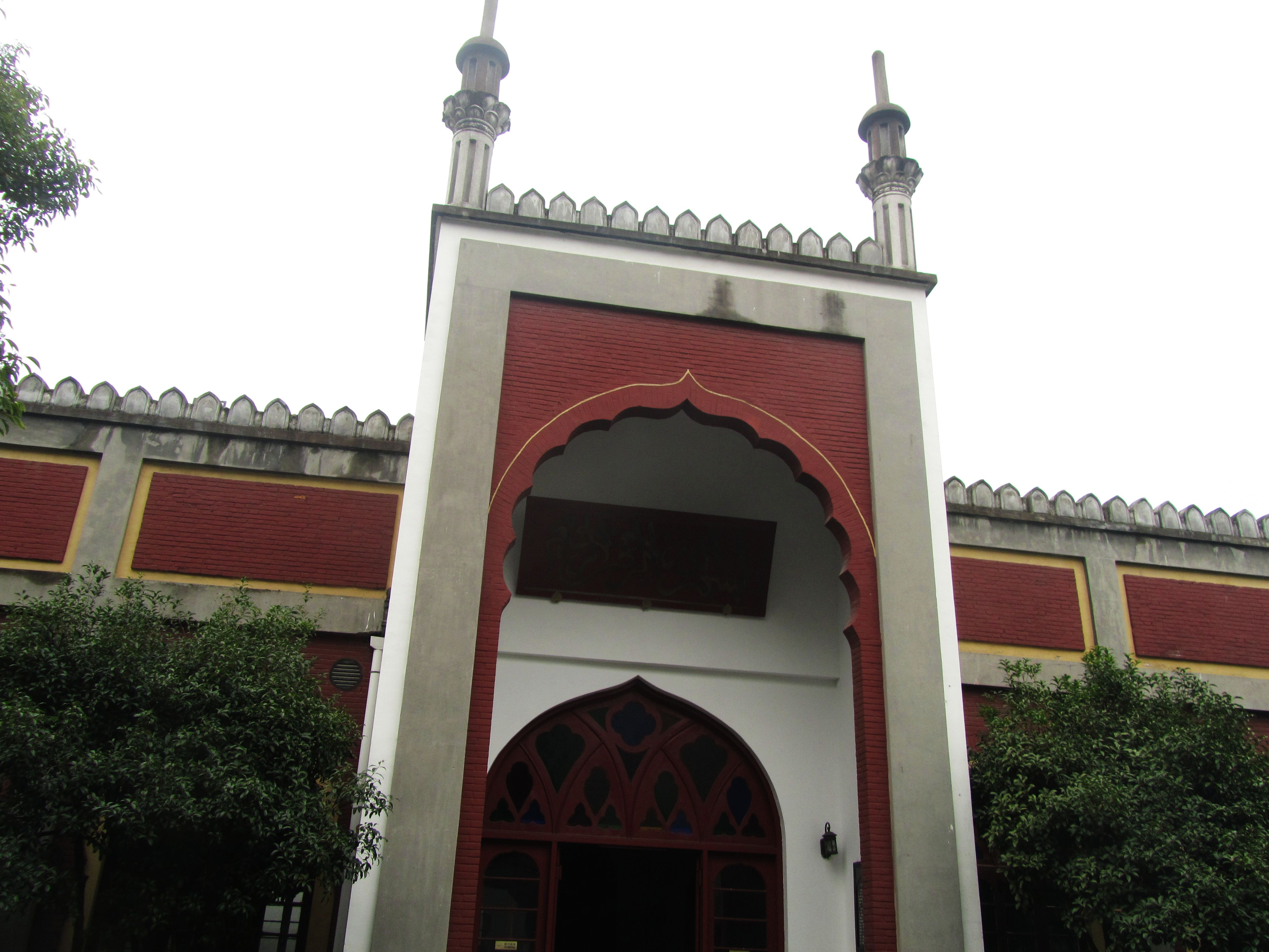 杭州凤凰寺，大殿前门。